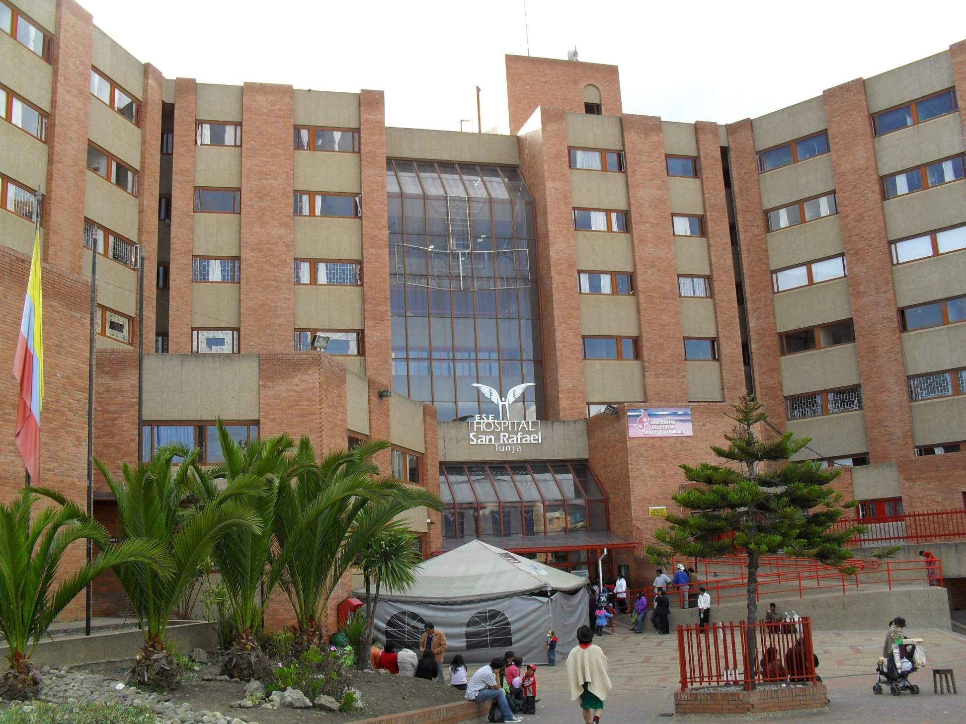 Fachada del Hospital San Rafael de la ciudad de Tunja, Colombia